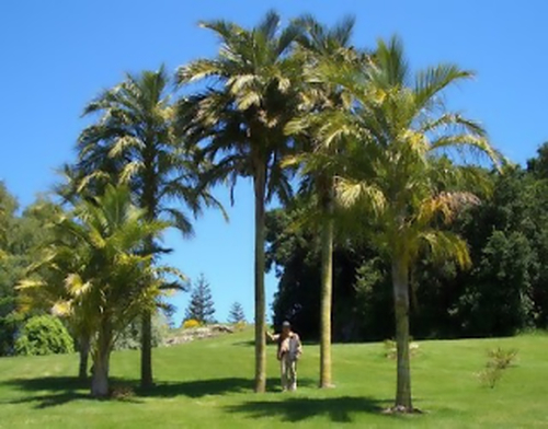 Juania australis (Chonta) - Chile